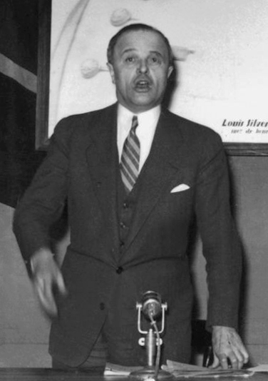 Louis Darquier Of Pellepoix Between 1942-1944